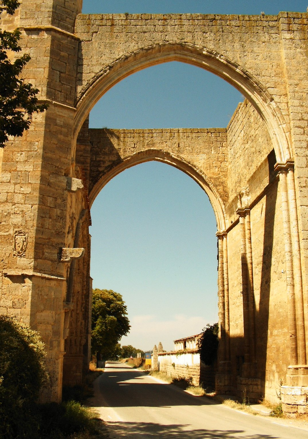 Ruinas del convento de San Antón en Castrojeriz (Burgos, España). El único elemento que queda en pie es un arco que formaba un túnel por donde entraban y salían los peregrinos.